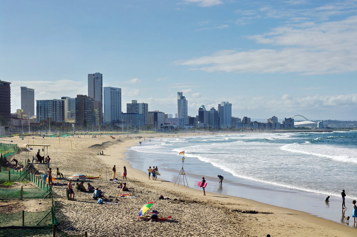 Blick vom Kai uShaka Beach, Durban